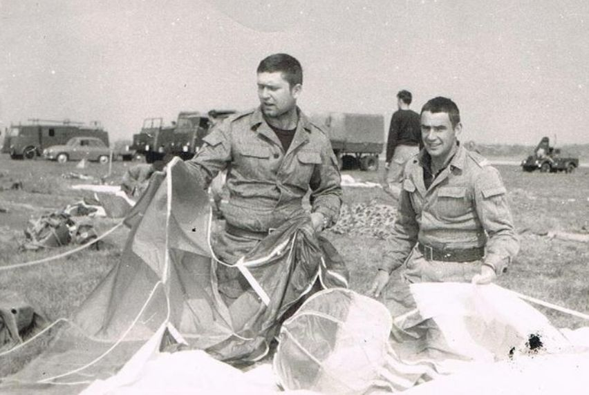 Kompania specjalna 8 br podczas szkolenia spadochronowego